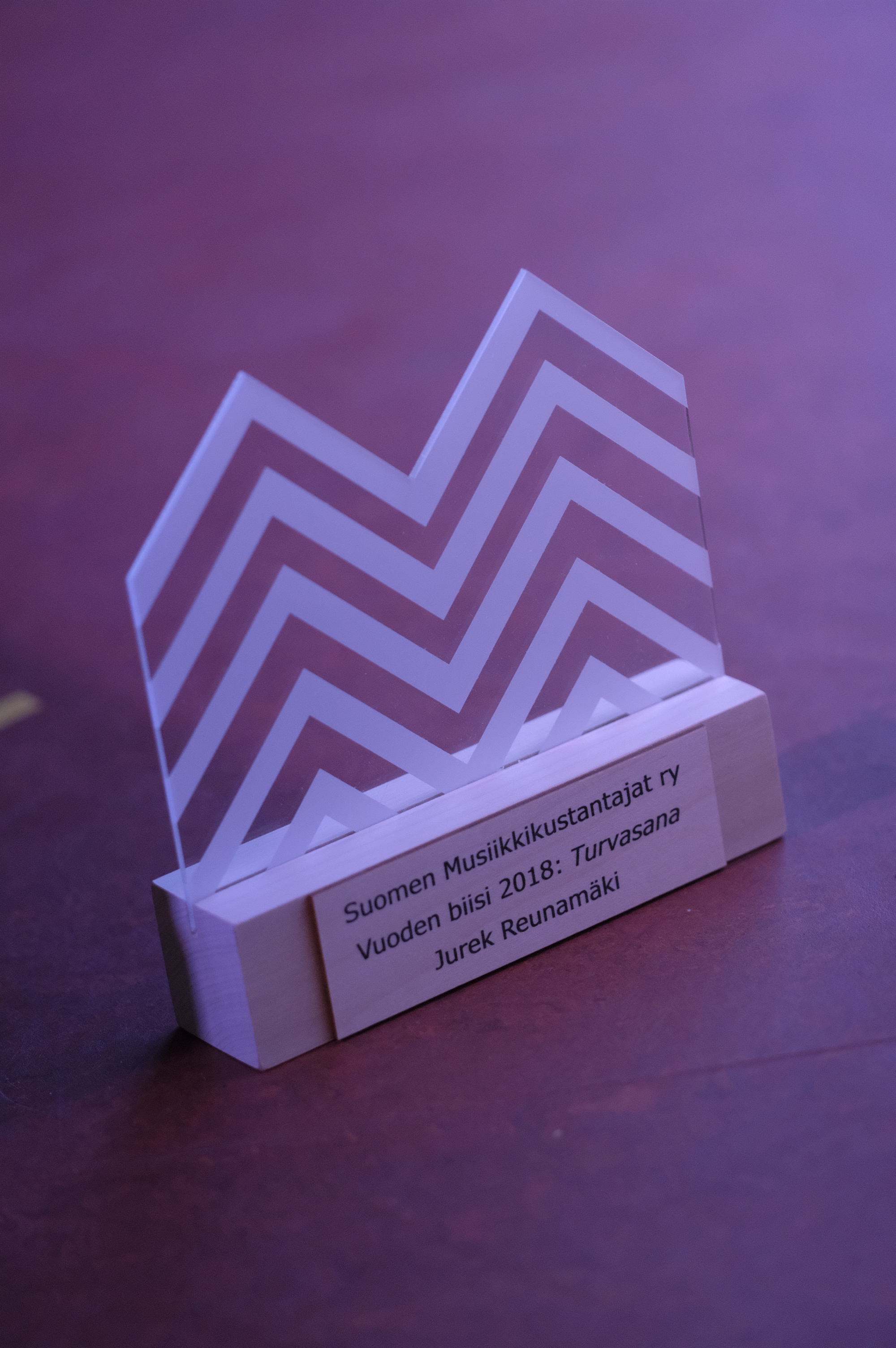 Kuva pystistä.